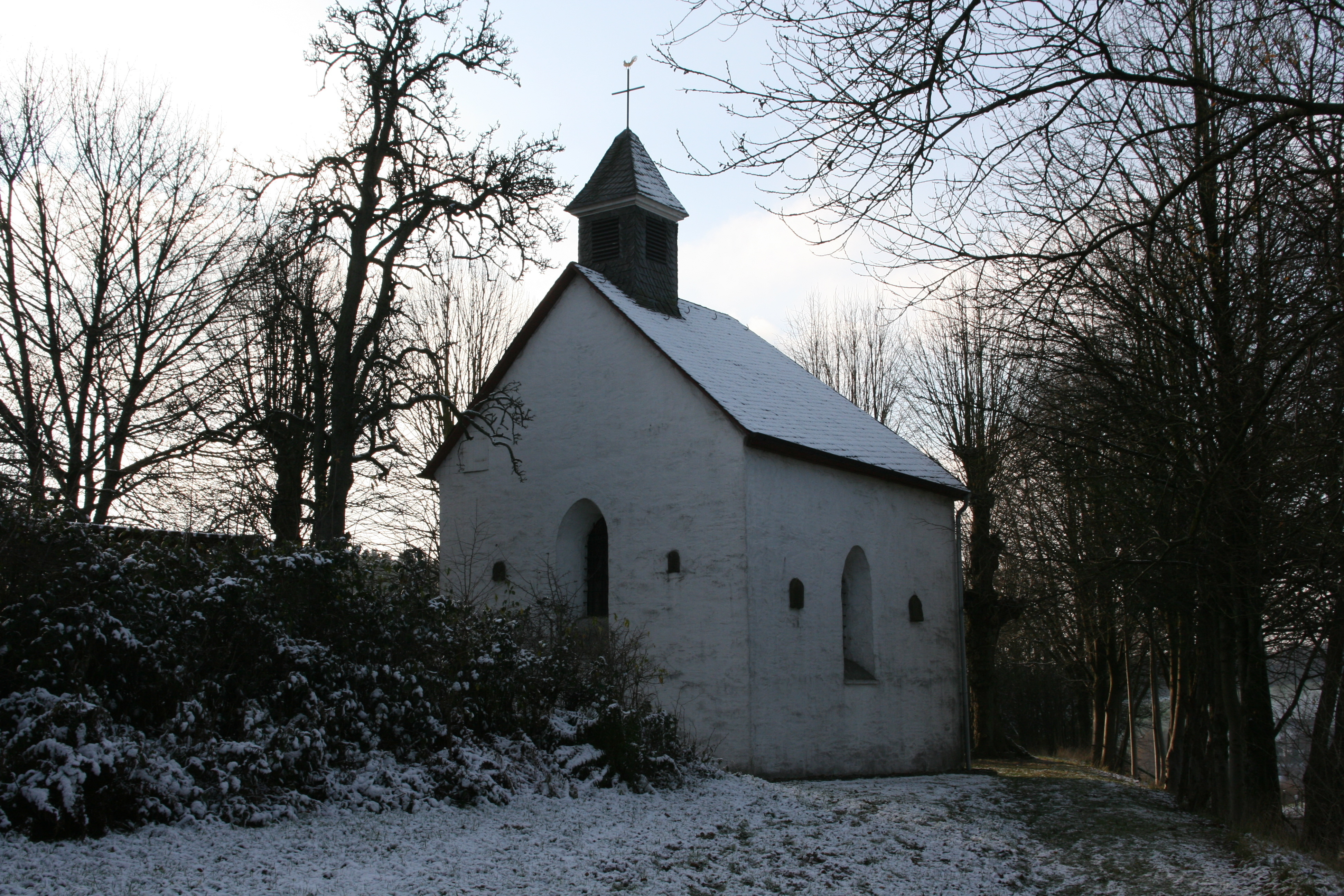 St.-Lucia-Kapelle, Klauser Straße in Lindlar